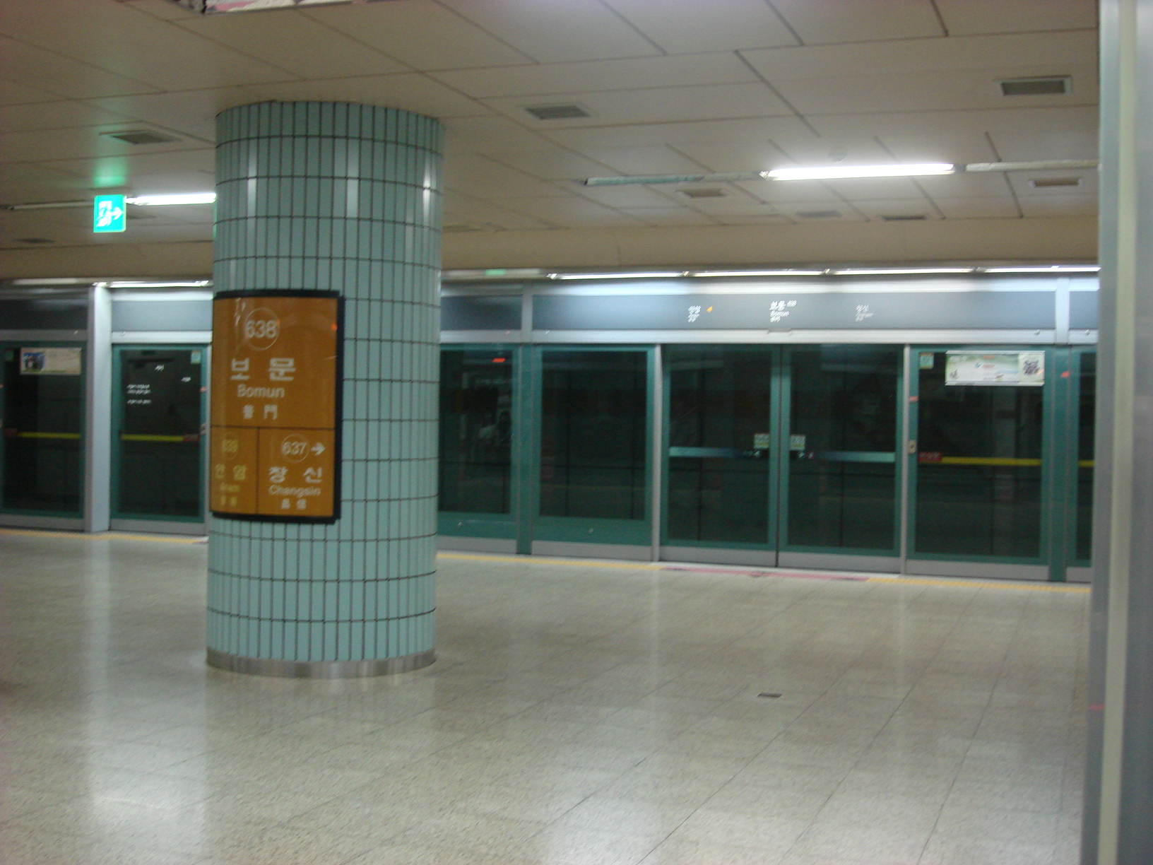 보문역 역명판